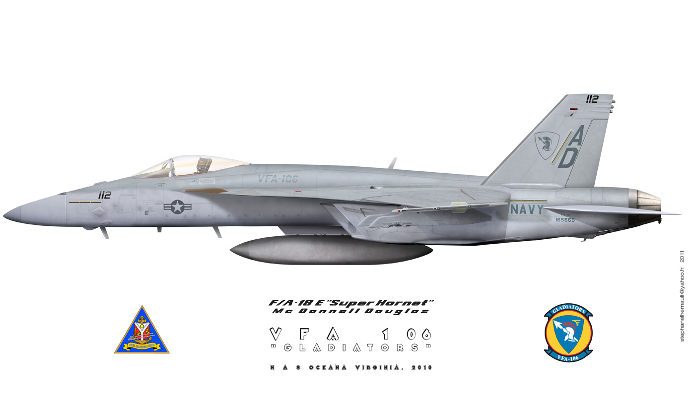 F:A 18 E super hornet VFA 106